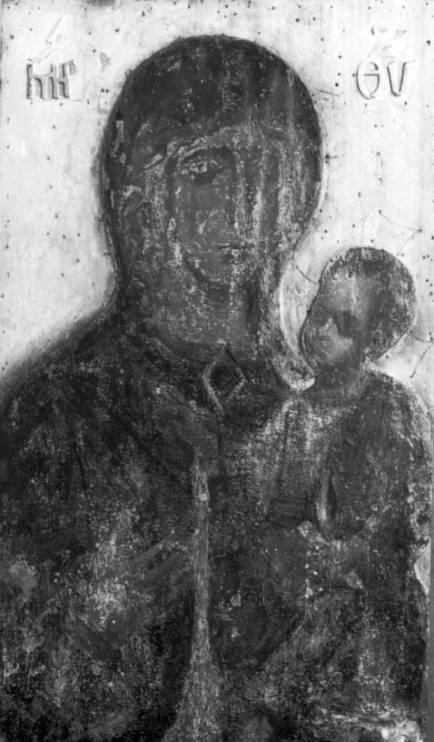 Madona Svatotomská, italská ikona z druhé poloviny 13. století, zasazená do stříbrného oltáře v bazilice augustiniánského opatství v Brně. Stav před restaurováním, které provedla Hedvika Böhmová mezi lety 1945-46.